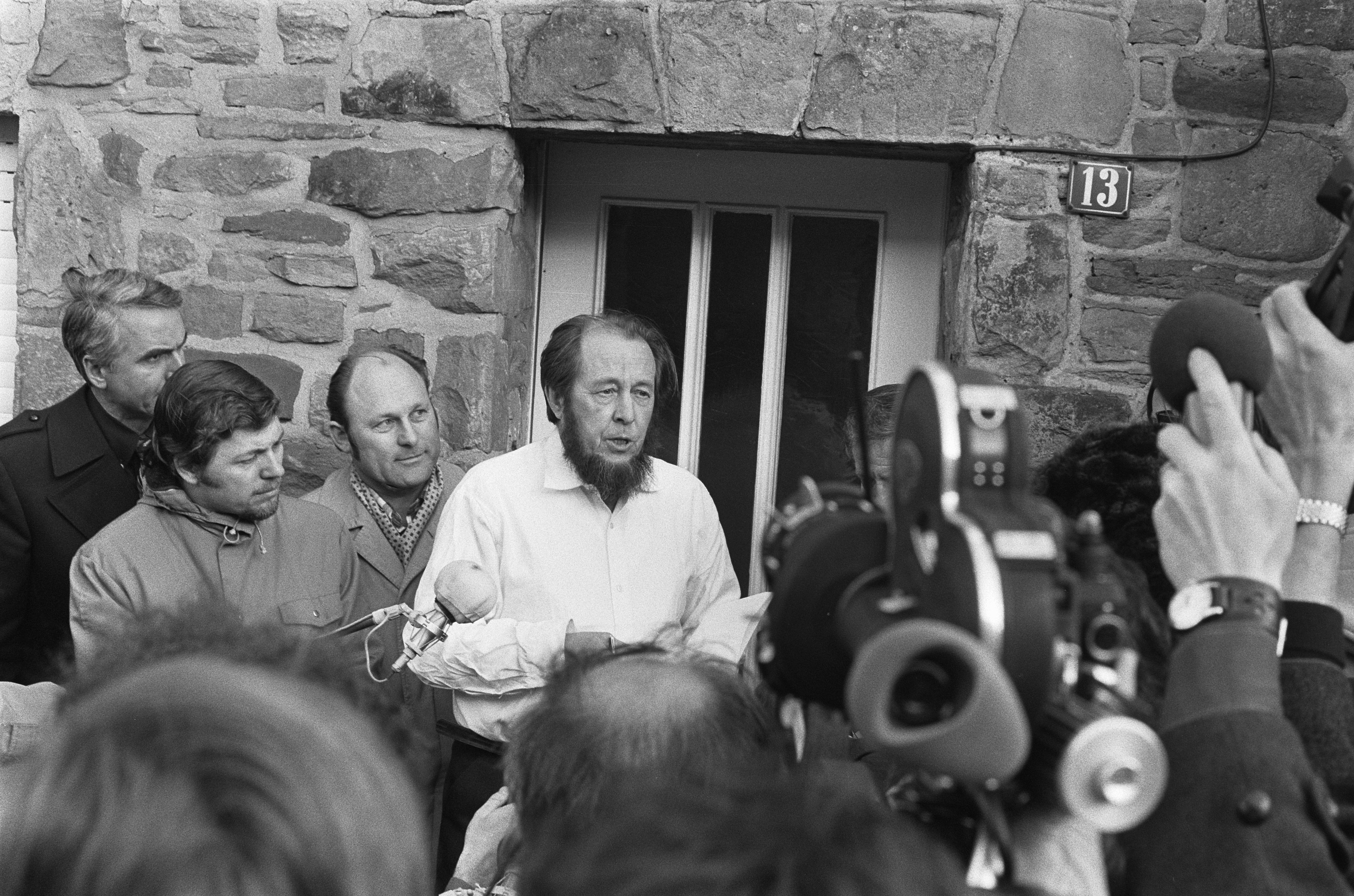 Collectie / Archief : Fotocollectie Anefo Reportage / Serie : De Russische schrijver Alexander Solzjenitsyn is uitgewezen uit Rusland en verblijft nu in het huis van Heinrich Böll Beschrijving : De schrijver staat de pers te woord Datum : 14 februari 1974 Locatie : Duitsland, Keulen Trefwoorden : pers, schrijvers Persoonsnaam : Solzjenitsyn, Alexander Fotograaf : Bert Verhoef / Anefo Auteursrechthebbende : Nationaal Archief Materiaalsoort : Negatief (zwart/wit) Nummer archiefinventaris : bekijk toegang 2.24.01.05 Bestanddeelnummer : 927-0023